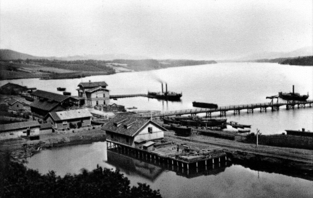 DS Skibladner, der unter Denkmalschutz stehende älteste noch in Betrieb befindliche Raddampfer der Welt auf einer historischen Aufnahme von 1866. Die Aufnahme entstand 1866 im Hafen von Eidsvoll am Mjøsasee (Norwegen)